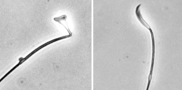 Katil spermlerin kayıtları.